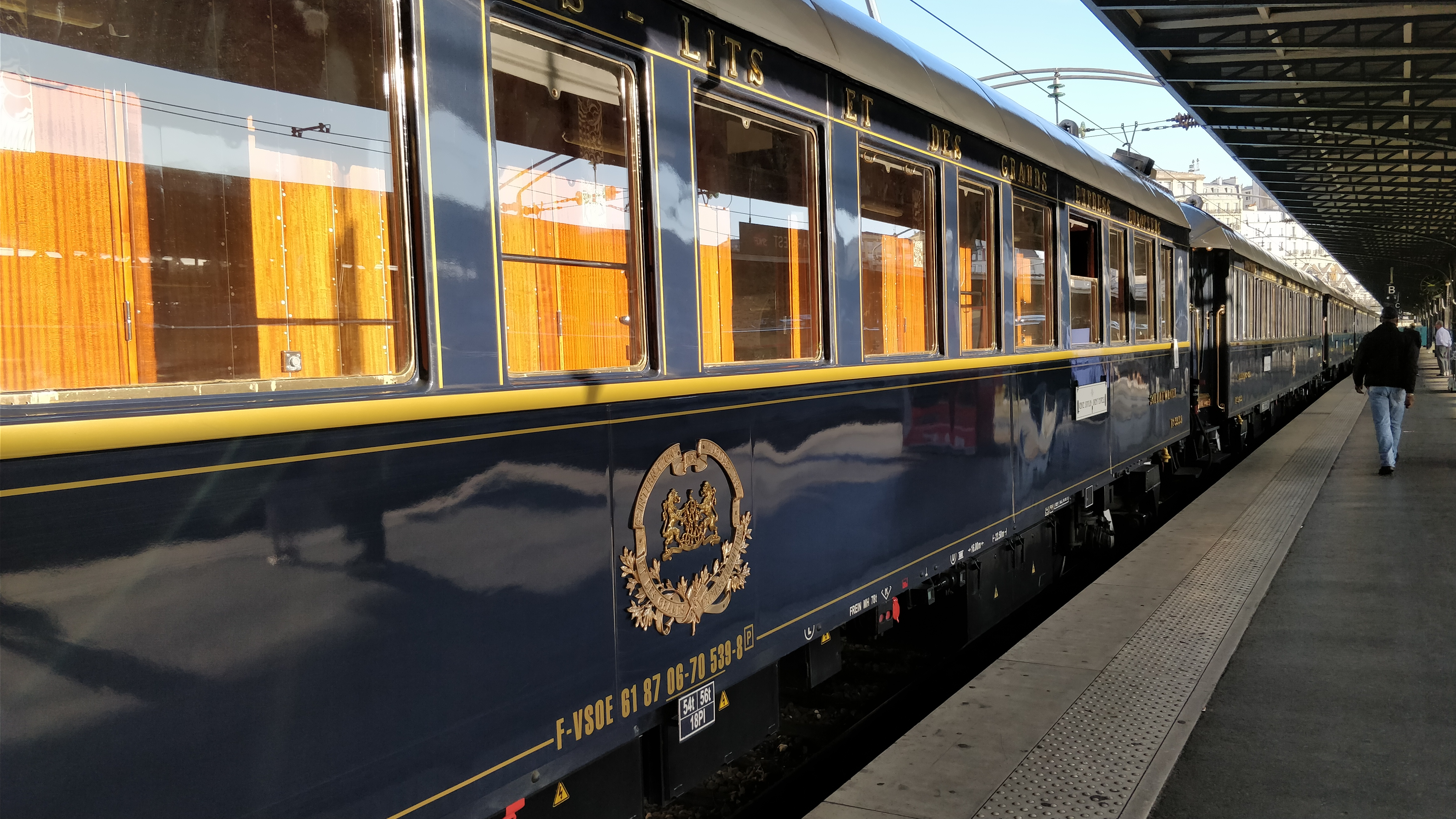 Venice Simplon - Orient Express